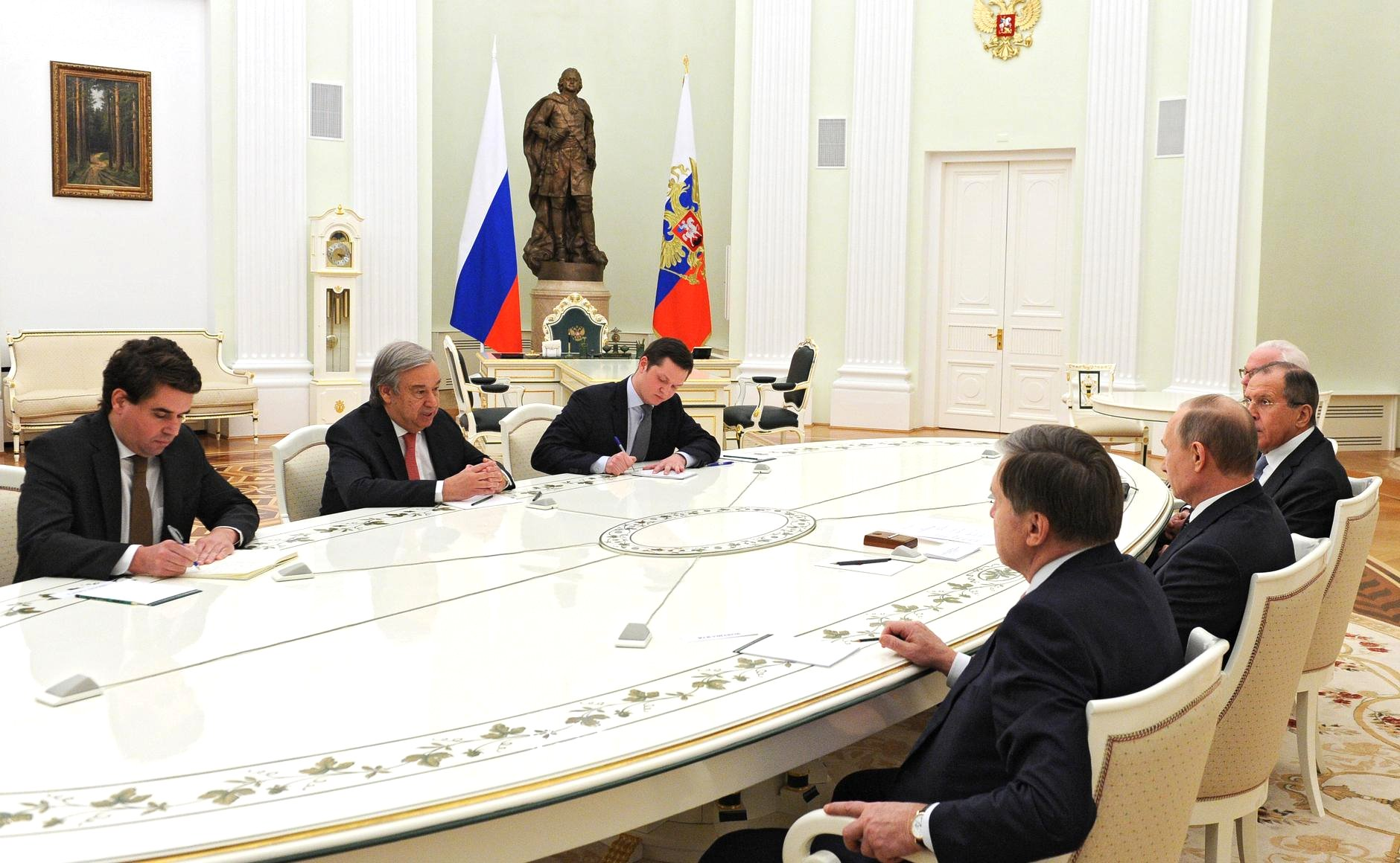 Встреча с избранным Генеральным секретарём Организации Объединённых Наций Антониу Гутеррешем.